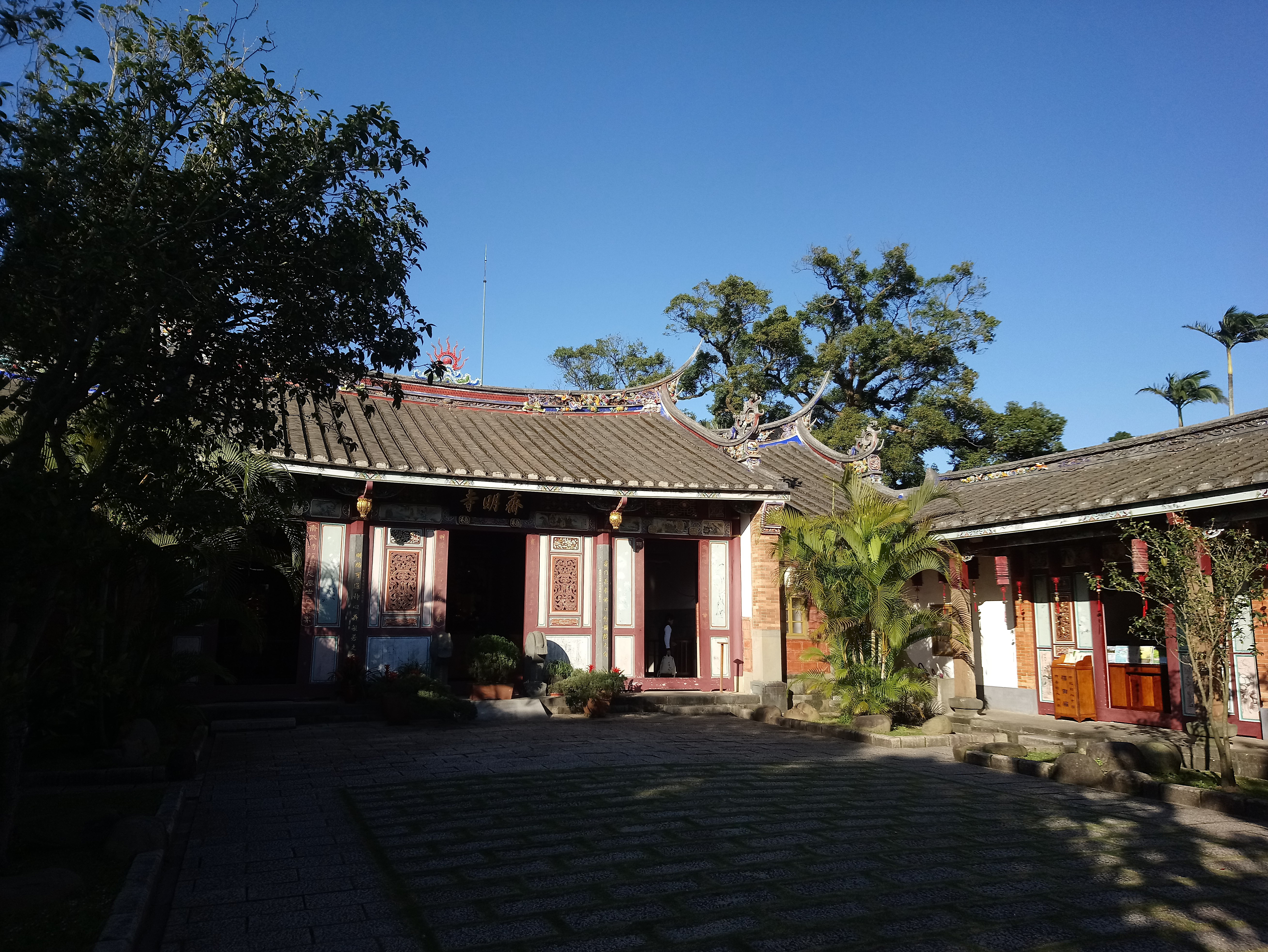 大溪齋明寺近景,桃園市大溪區光明里